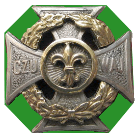 Zielona podkładka pod Krzyżem Harcerskim jest oznaczeniem stopnia podharcmistrza .W tym przypadku podharcmistrza ze stopniem harcerskim Harcerz Rzeczypospolitej lub Harcerka Rzeczypospolitej